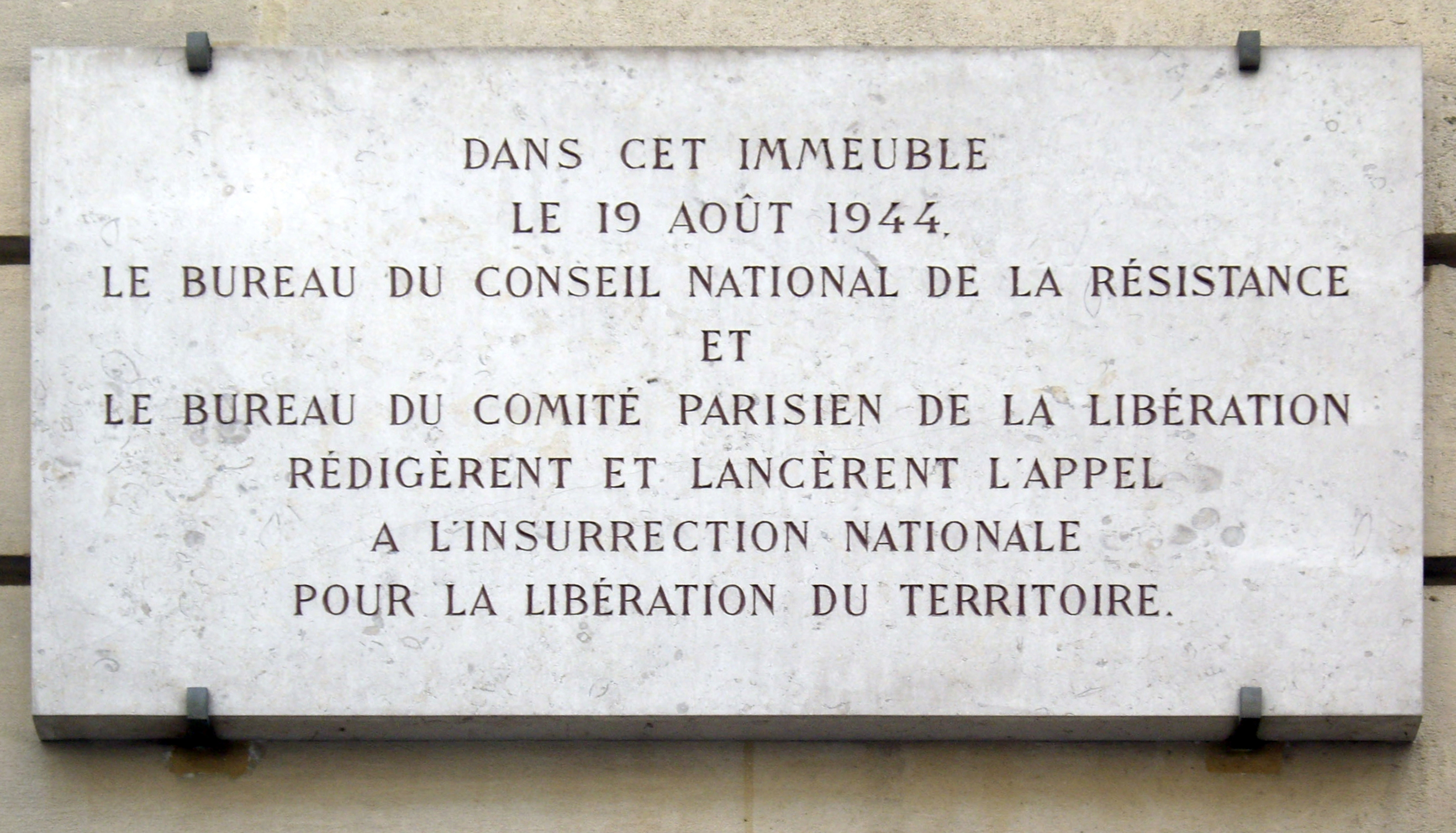 Plaque apposée au n° 41 de la rue de Bellechasse, Paris 7e, où fut rédigé et lancé l'appel à l'insurrection nationale pour la libération du territoire, le 19 août 1944, par le bureau du Comité national de la Résistance et le bureau du Comité parisien de la Libération.